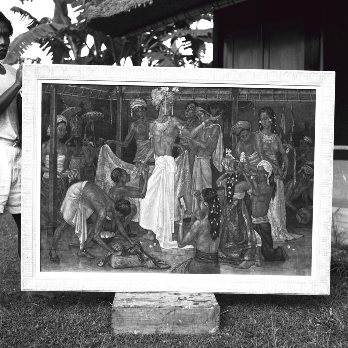 Lukisan "Berpakaian untuk acara" oleh Rudolf Bonnet, di taman pelukis.